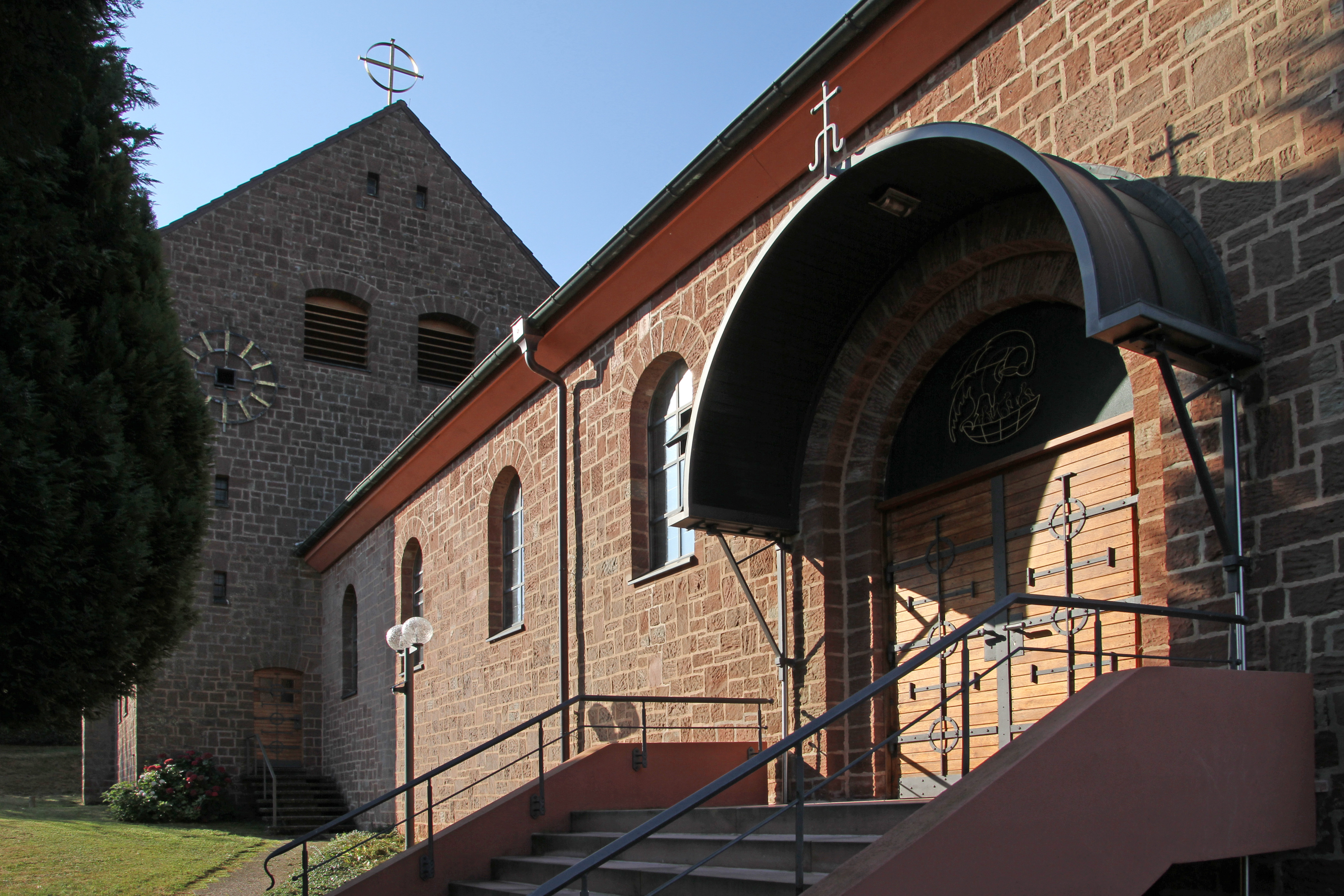 Donsieders, Clauser Straße 6; katholische Kirche Herz-Jesu; romanisierender Bruchsandsteinsaal, 1934, Architekt Albert Boßlet, Würzburg.